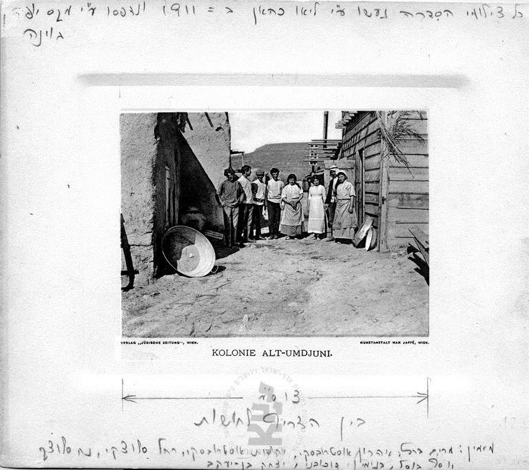 מתיישבי אום ג'וני בין בקתות הבוץ